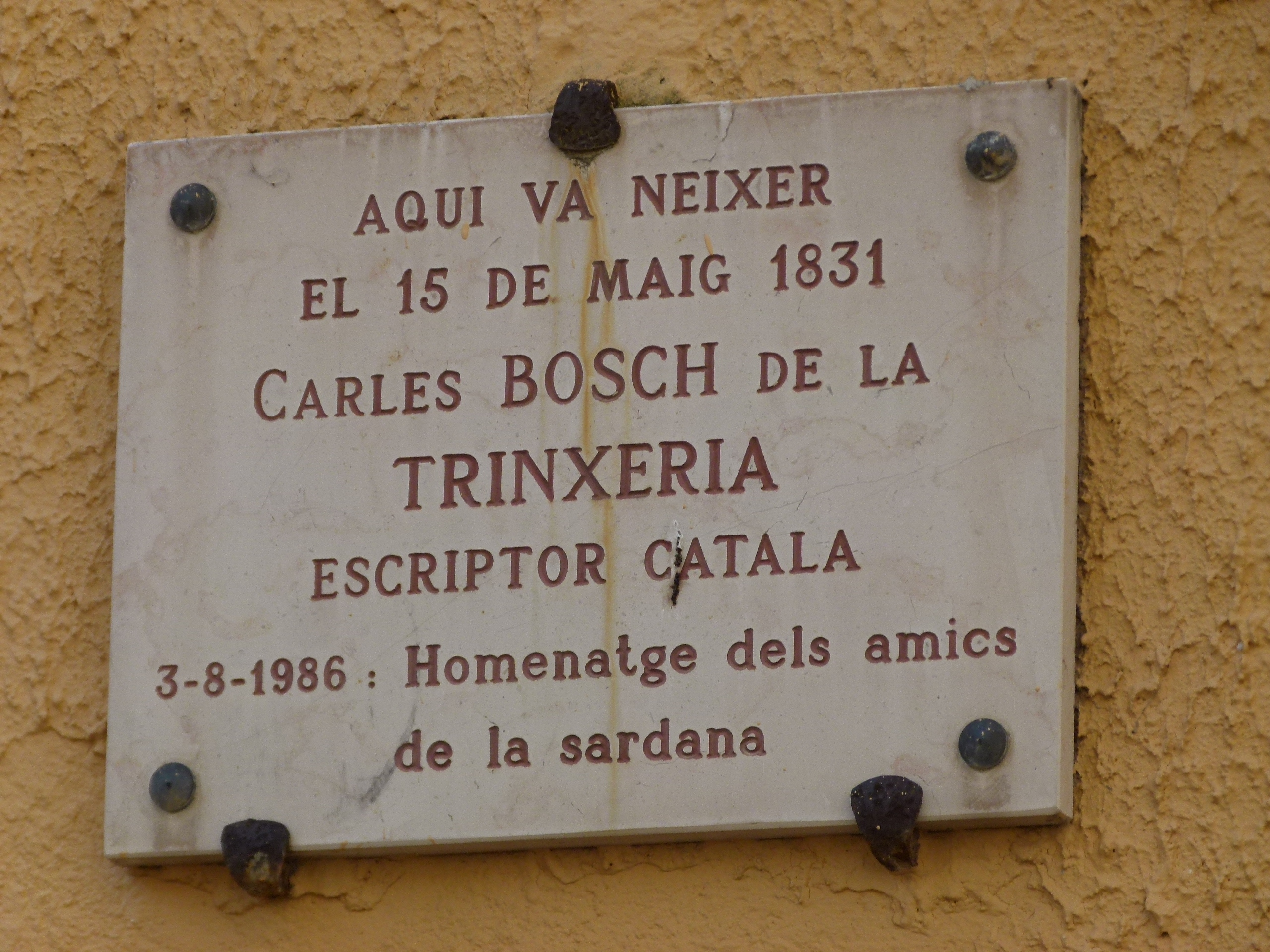 Placa commemorativa a la casa on va néixer l'escriptor Carles Bosch de la Trinxeria a Prats de Molló